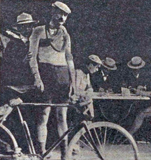 Fernand Vast, deuxième de Paris-Troyes en 1903.